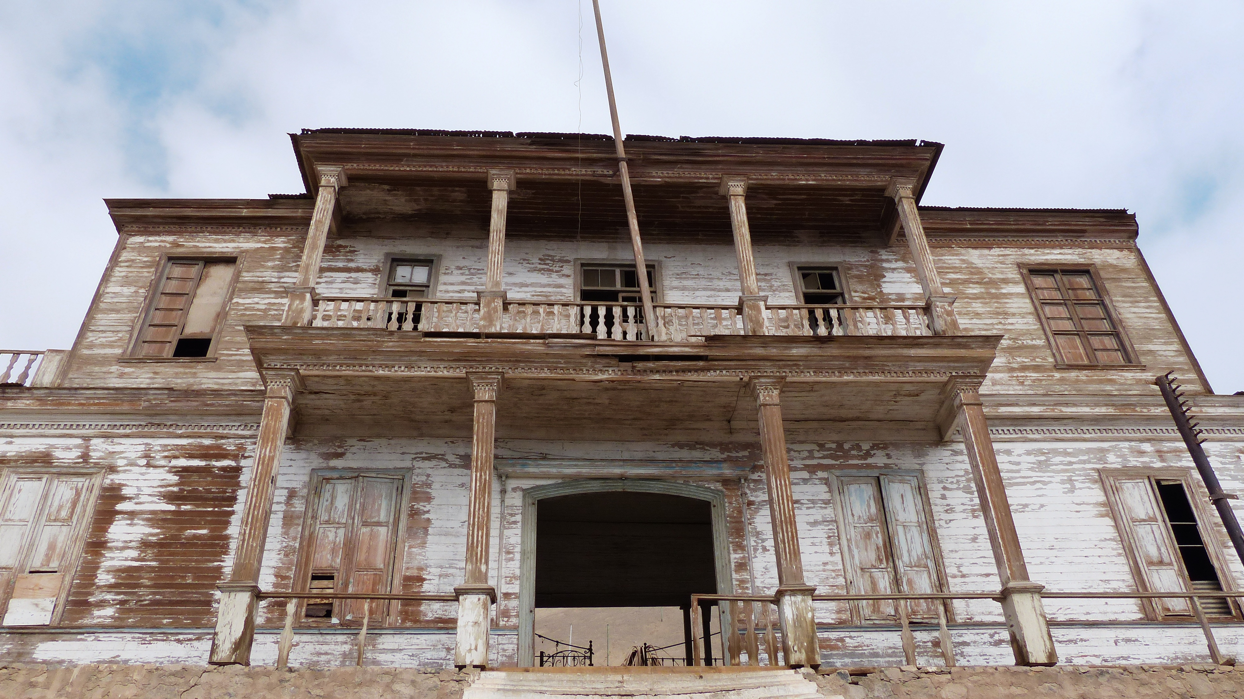 Hospital de Pisagua This is a photo of a national monument in Chile: 286